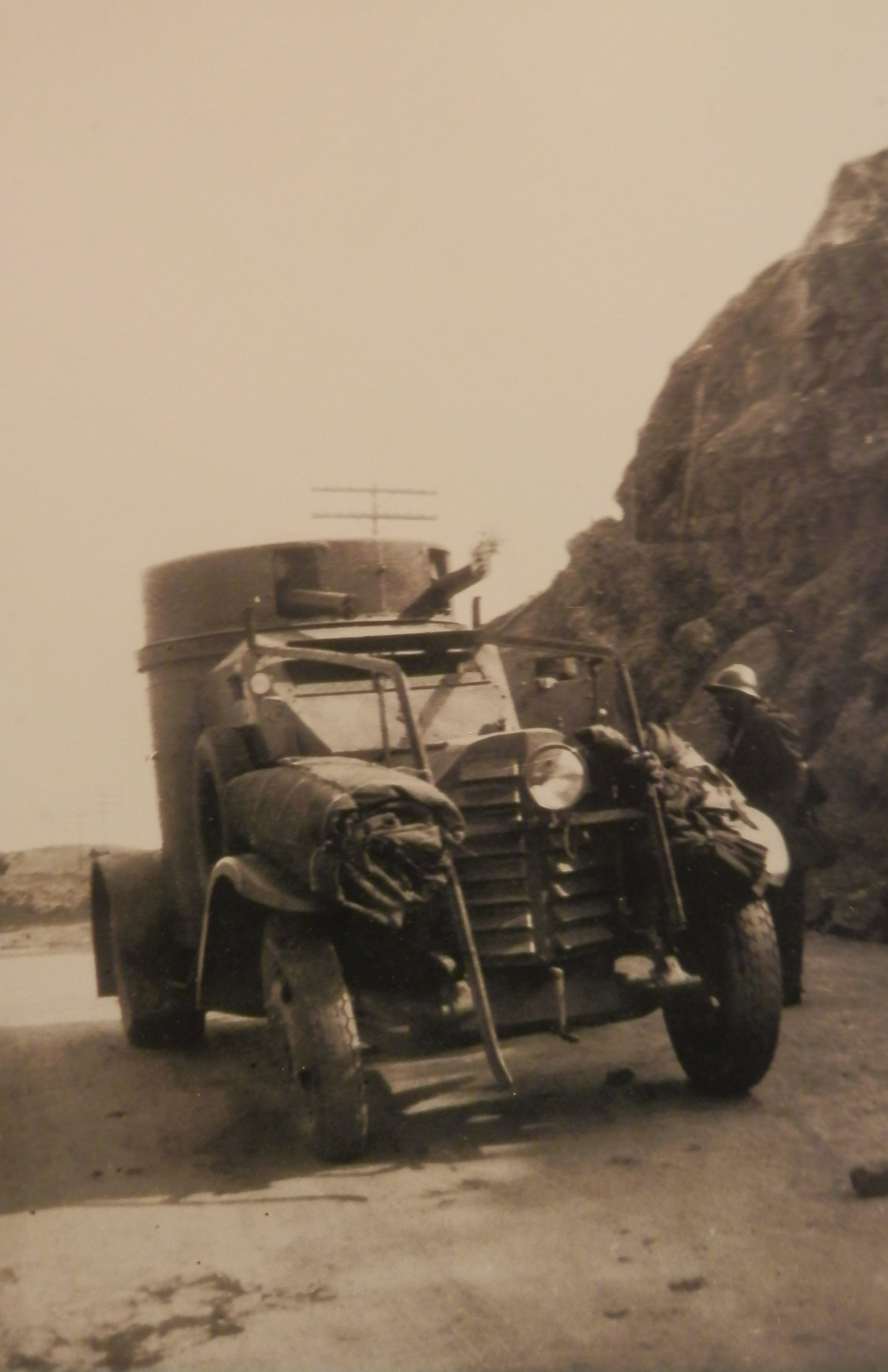 Fotografia de l'exposició "Fu la Spagna!" on apareix una autometralladora Ansaldo Lancia 1Z a les portes de Màlaga, el 7 de febrer de 1937.